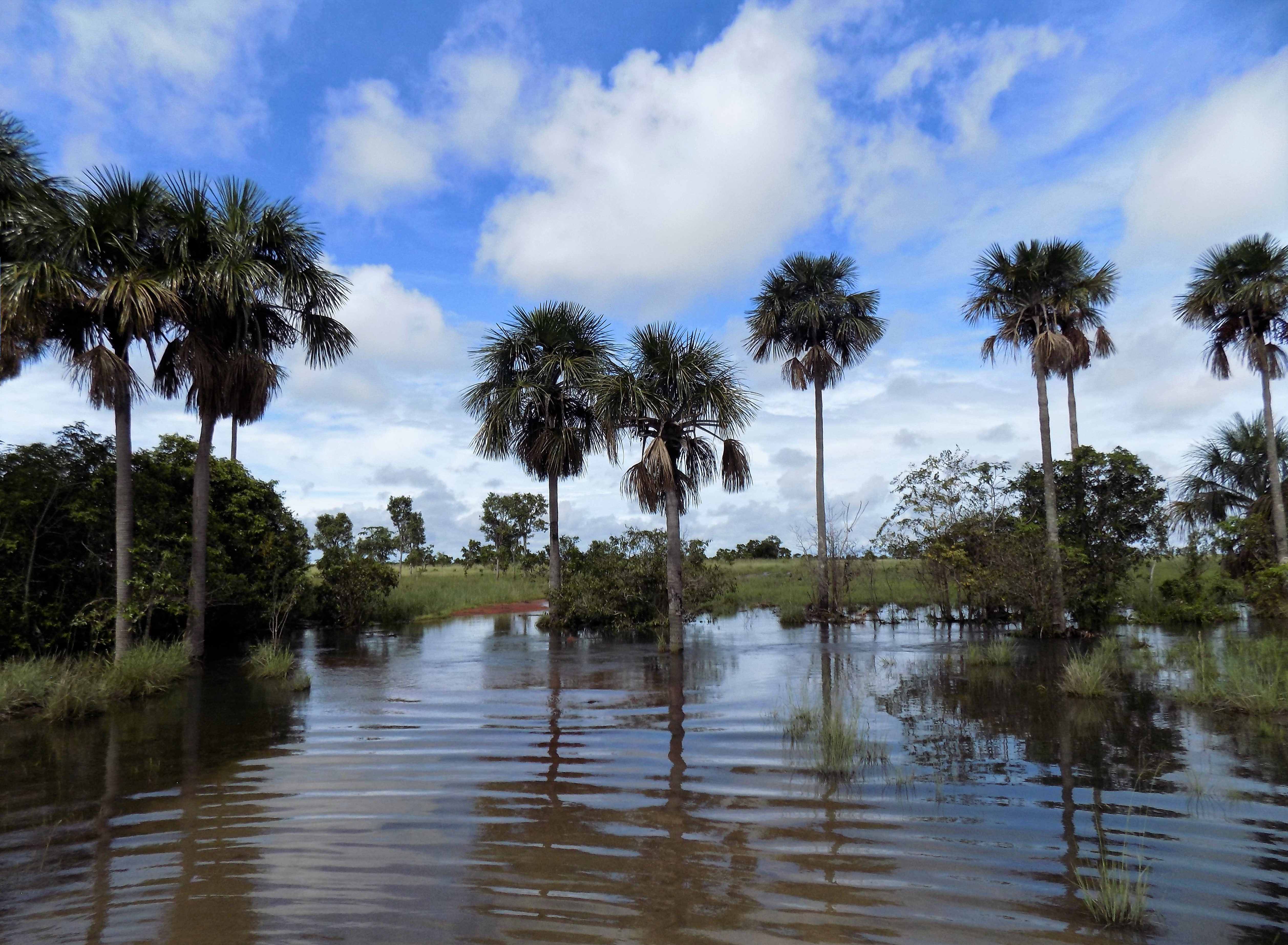 El morichal en su conjunto representa un reservorio de vida, dado que al hacer parte de los afloramientos de aguas subterraneas suple la necesidad de líquido y alimento a diversas especies de peces, anfibios, reptiles, aves y mamíferos (incluyendo al hombre y los animales domésticos) que habitan en sus cercanías durante la mayor parte del año, El incremento de las temperaturas en los meces de sequía ha logrado secar por algunos meses estos depositos de agua, lo que genera un impacto negativo en los sistemas biológicos que allí existen.